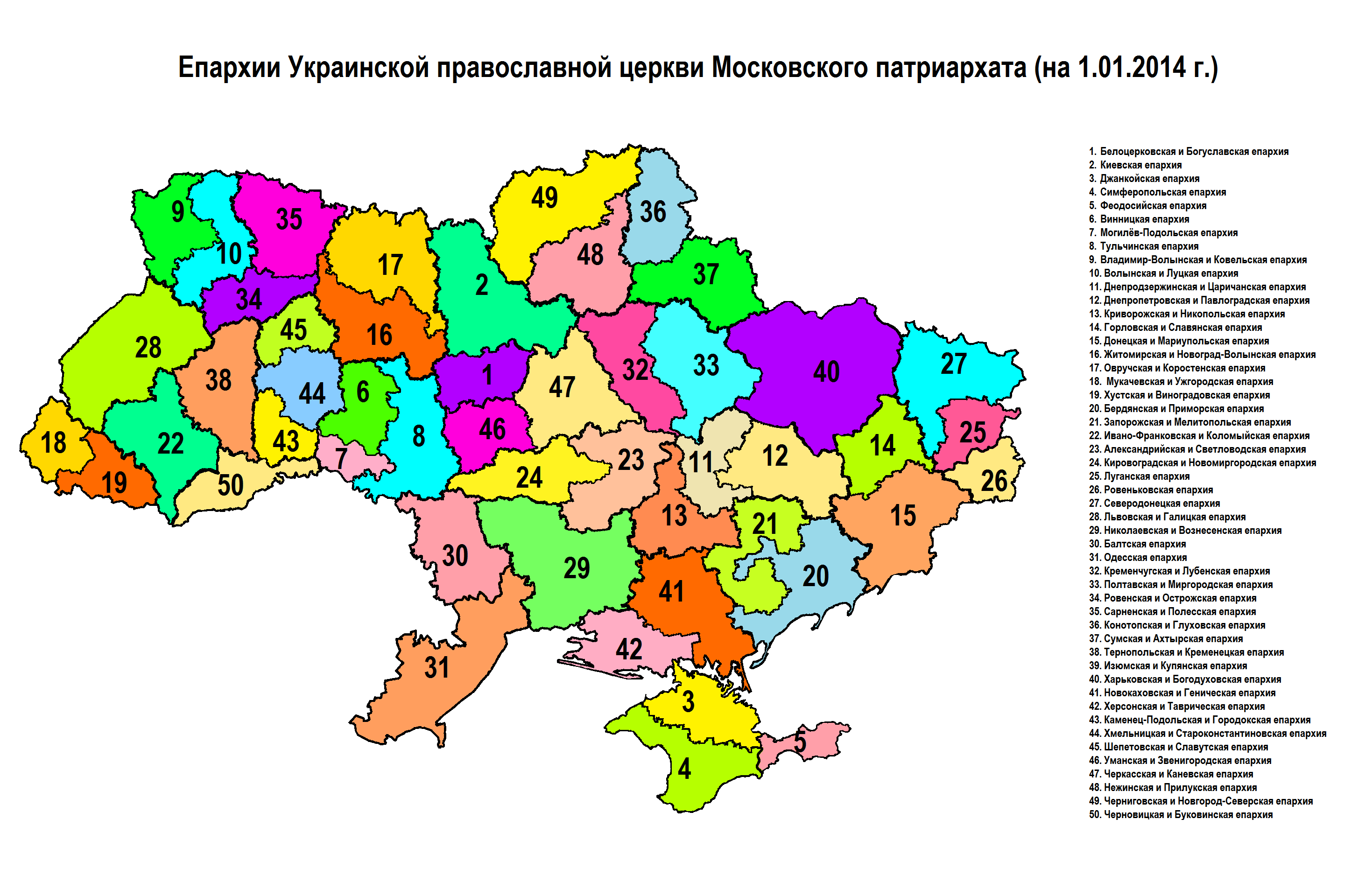 Епархии Украинской православной церкви Московского патриархата на 1.01.2014 г.